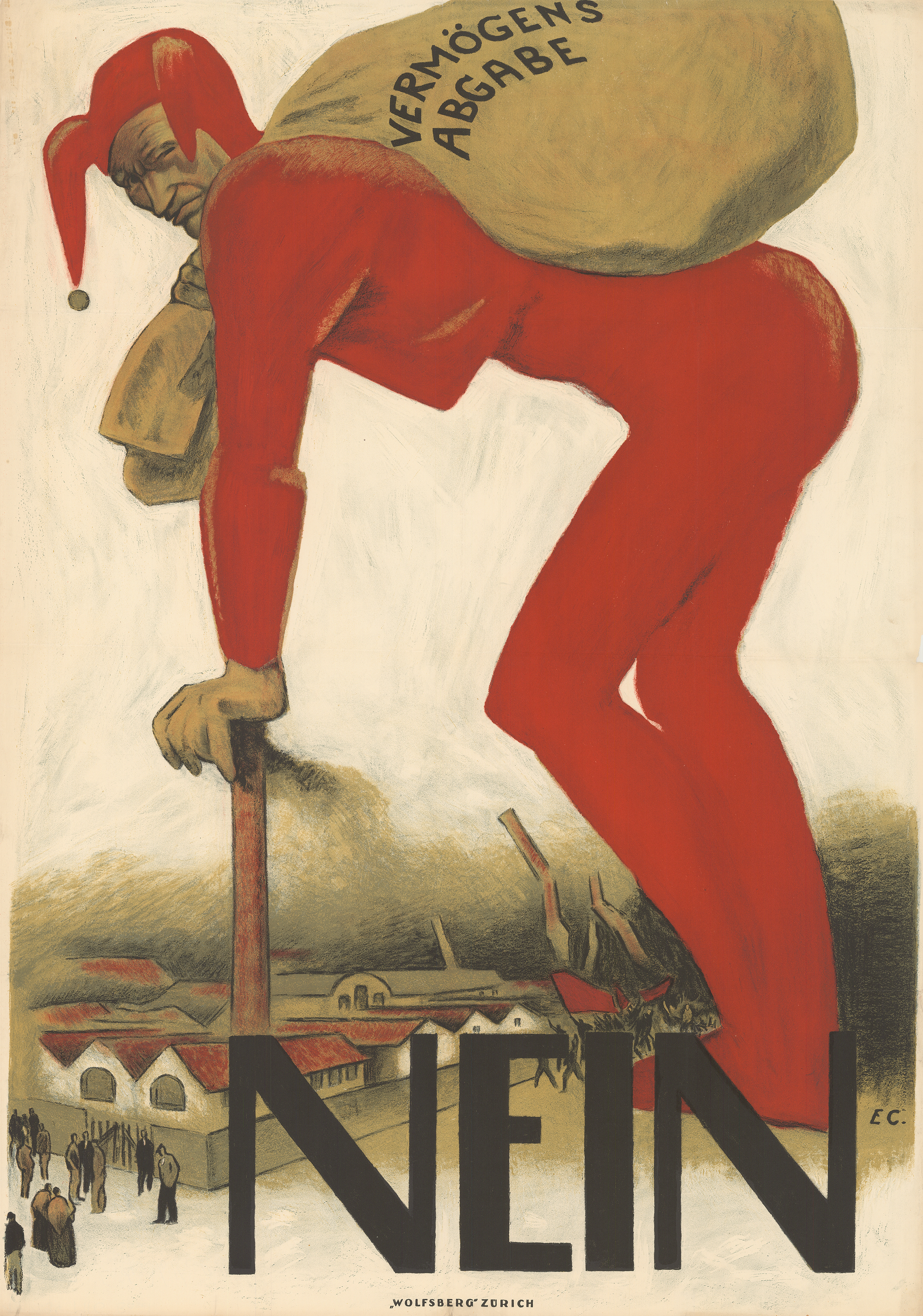 Abstimmungsplakat zur Eidgenössischen Volksinitiative «für die Einmalige Vermögensabgabe»